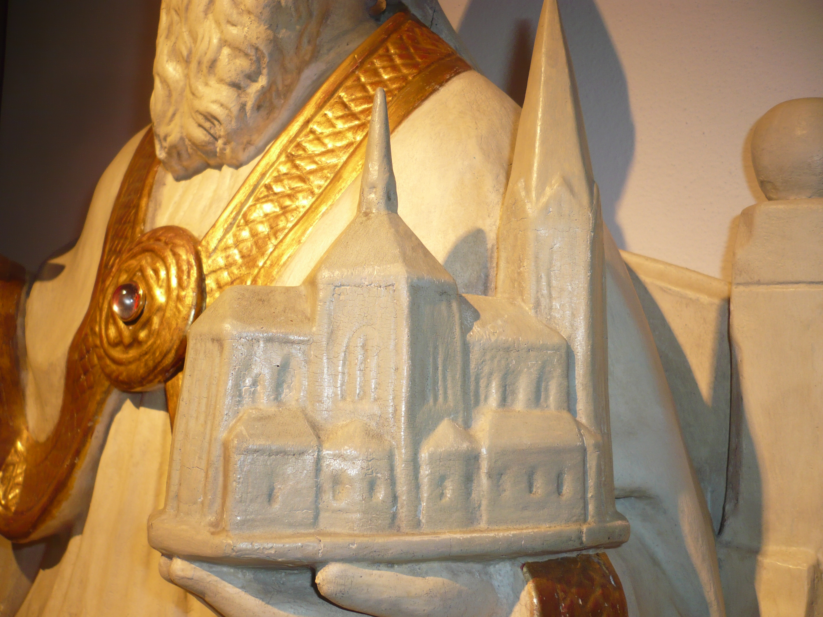 Medell der neugotischen Kirche von Franz Schmitz